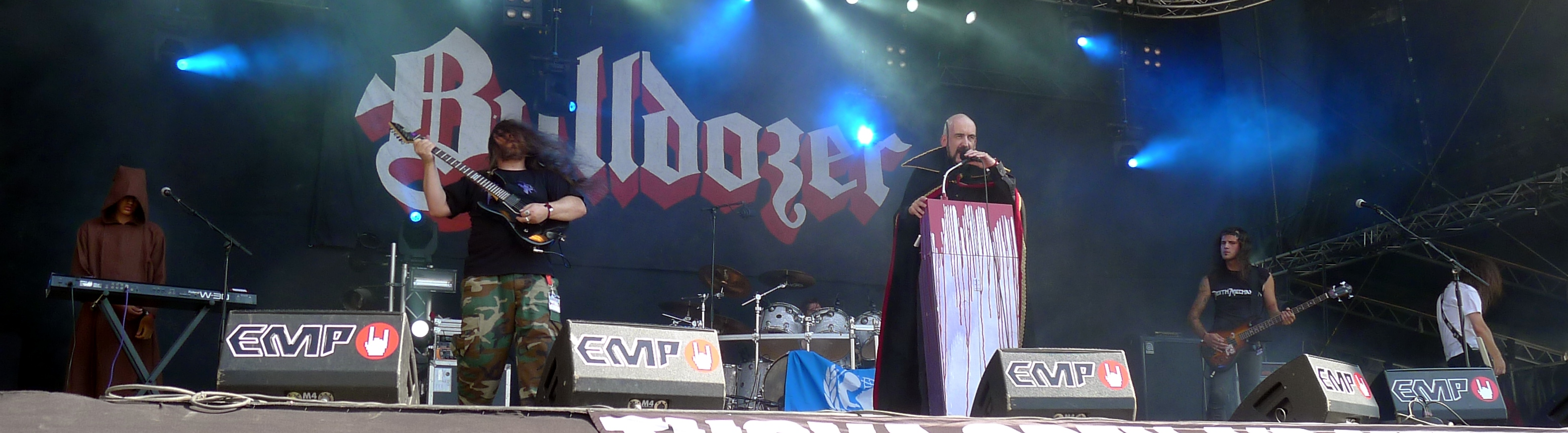 Bulldozer live am Tuska Open Air 2011